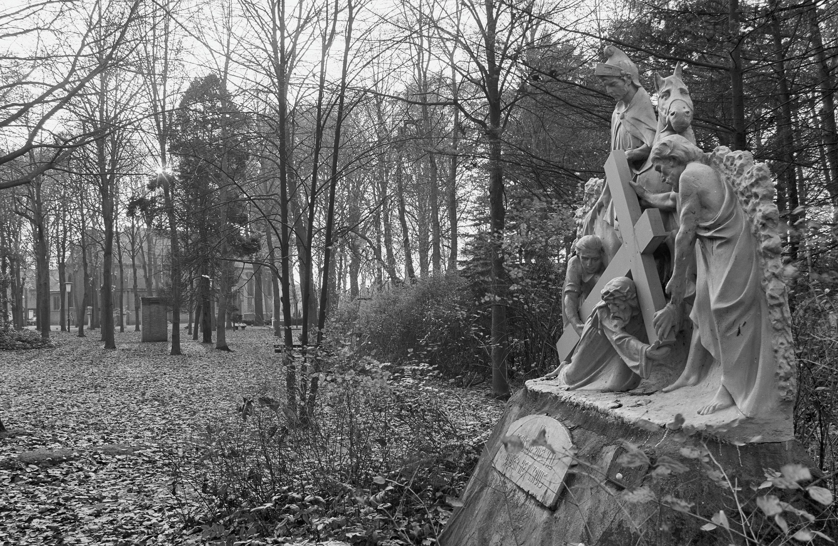 Kapel: statie, processietuin